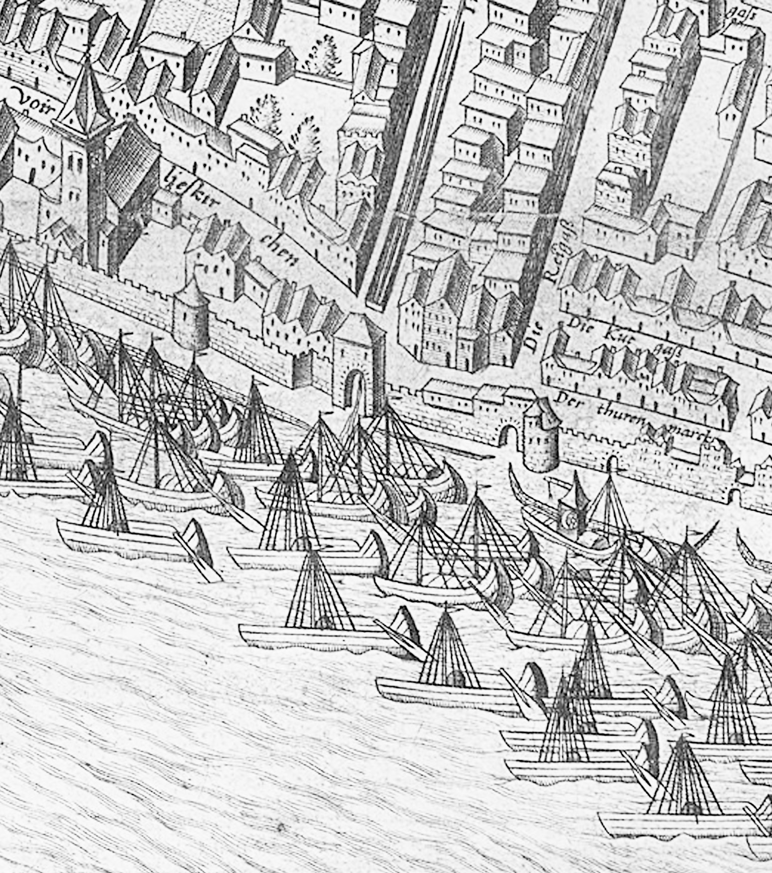 Ausschnitt des Mercator - Stadtplanes, Bereich Rheinmauer bei St. Maria Lyskirchen mit Filzengraben- und Rheingassentor nsch Arnold Mercator 1571